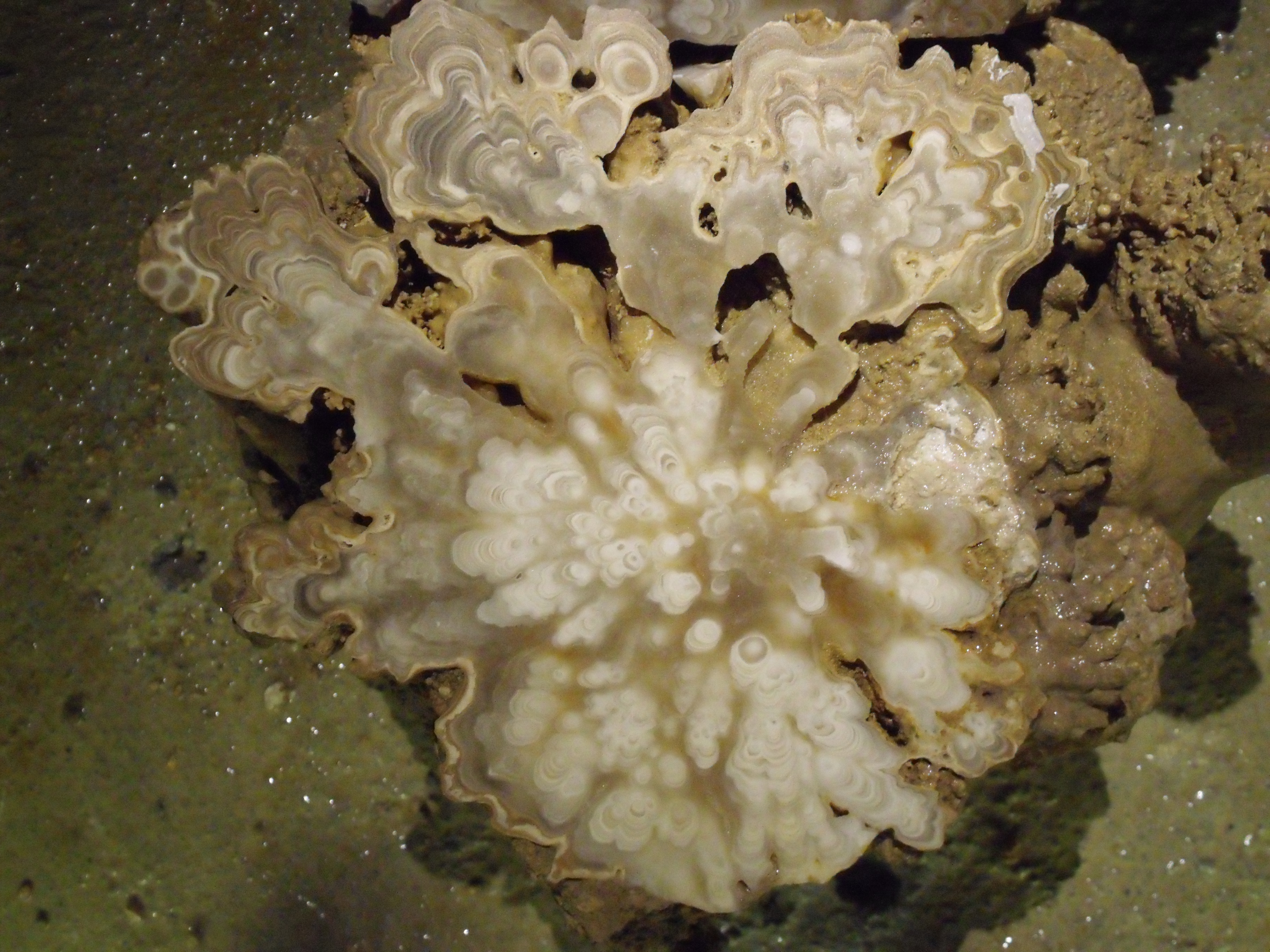 Сталагмит пресечен на пола